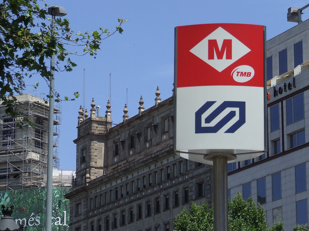 Senyal de Ferrocarrils de la Generalitat i Metro a la Plaça Catalunya, Barcelona.